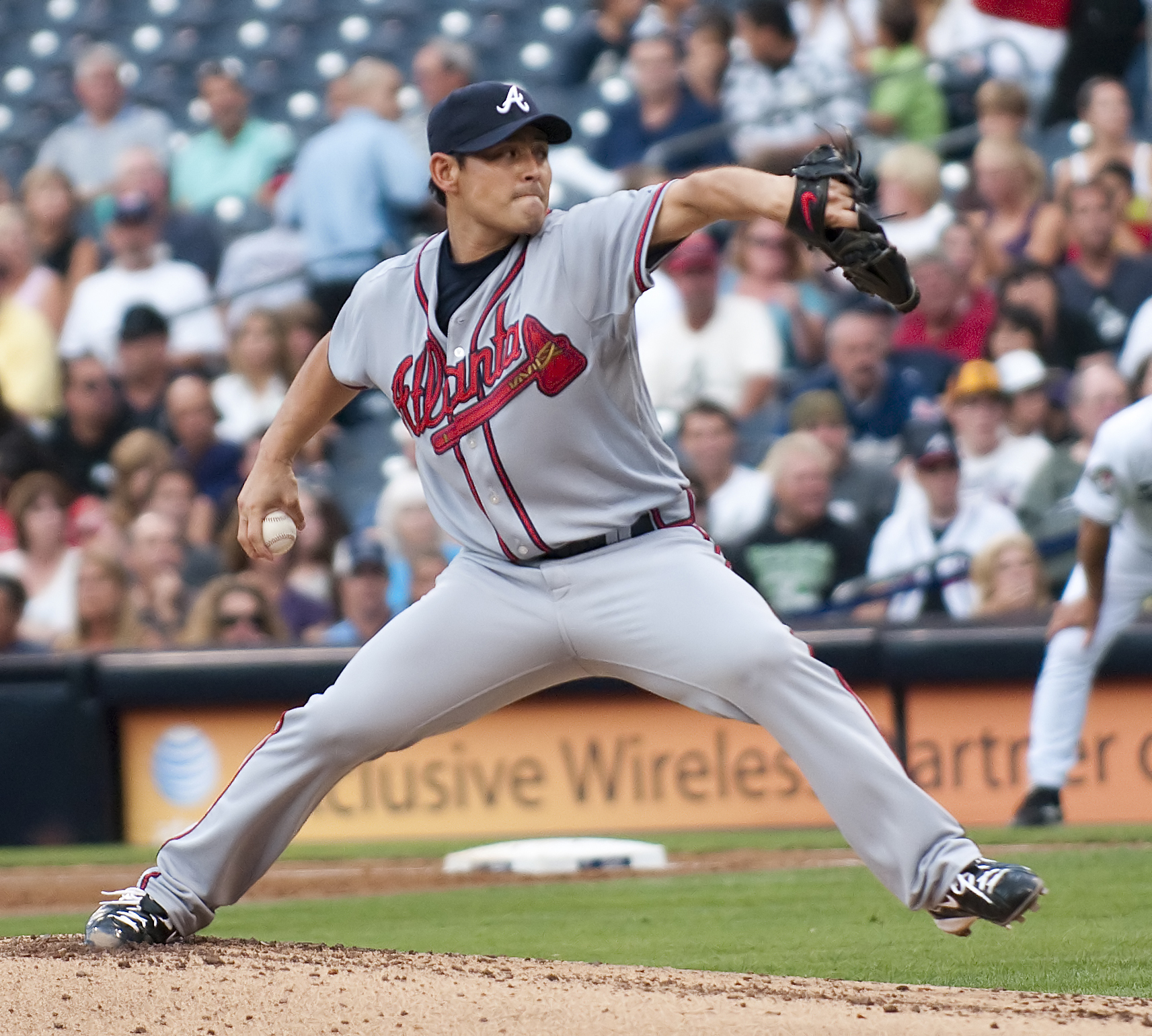 Kenshin Kawakami